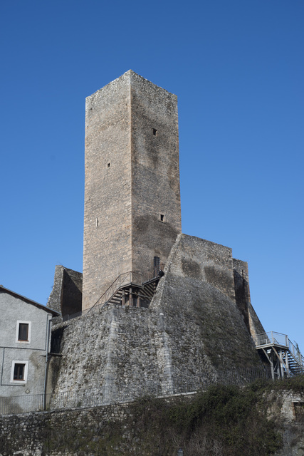 Dongione di Introdacqua, un'antica fortificazione che svetta sul paese